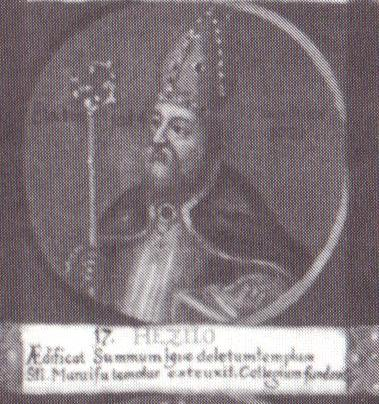 Hezilo von Hildesheim